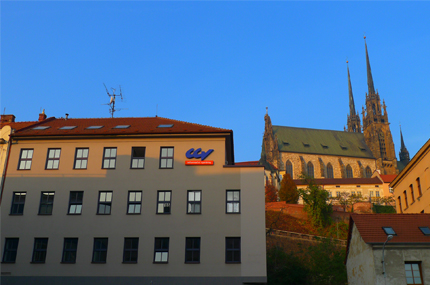 Fotografie sídla CCV Informační systémy na Kopečné 10 v Brně